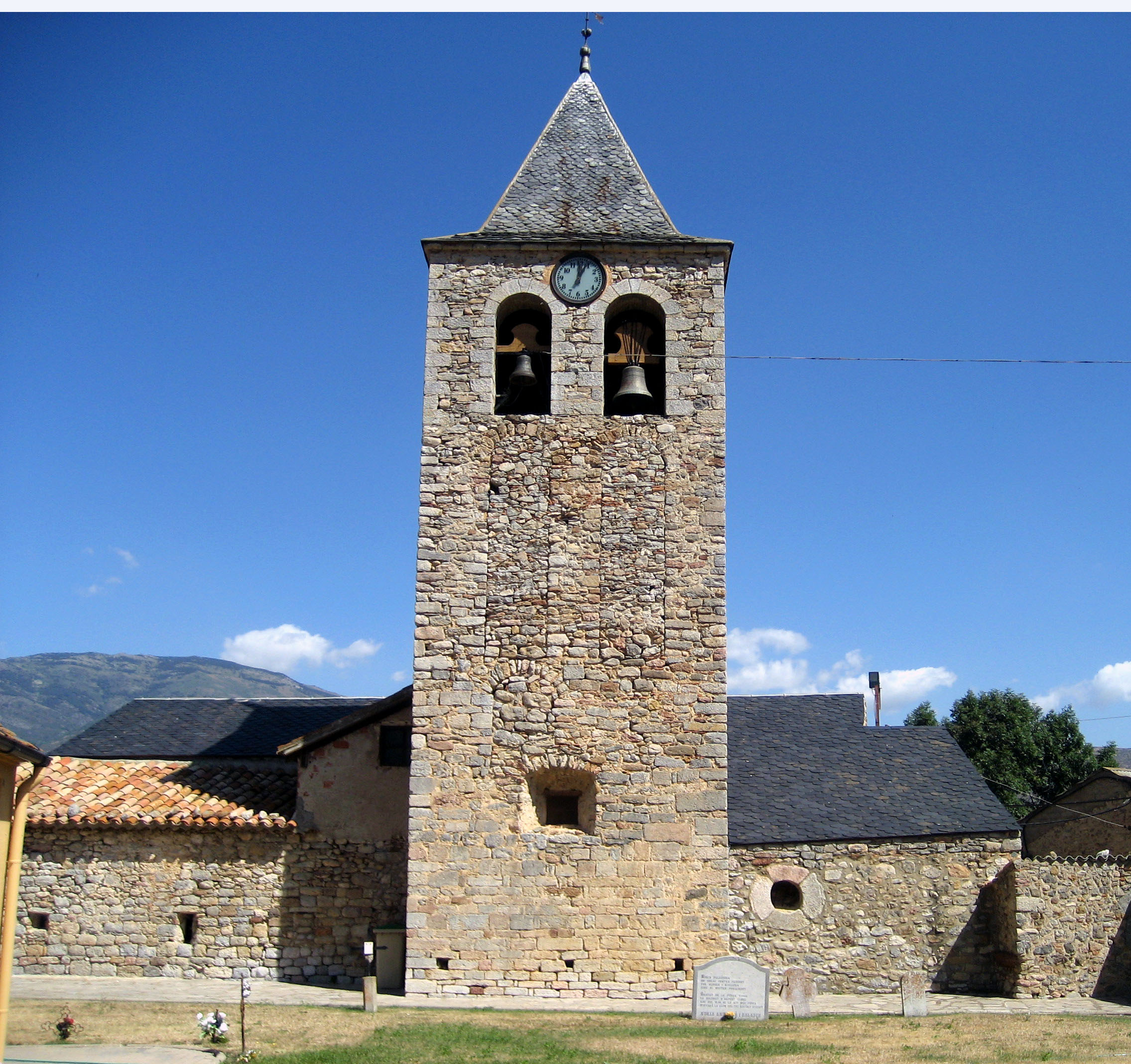 Església Santa Eulàlia de Pi. Població Pi de la Baixa Cerdanya. Catalunya